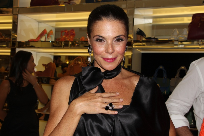 1 - Mylla Christie (3)